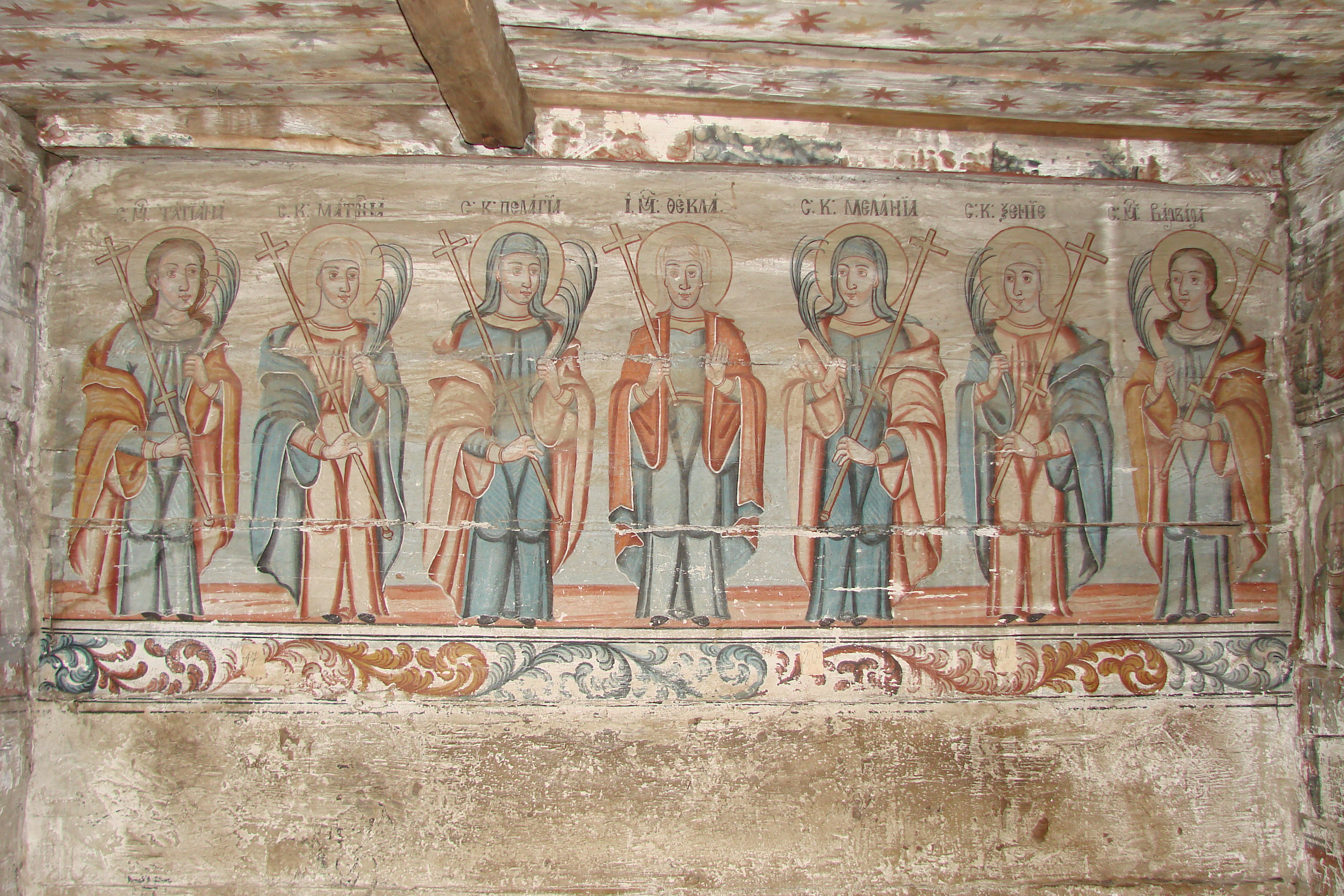 Biserica de lemn din Soconzel, judeţul Satu Mare.